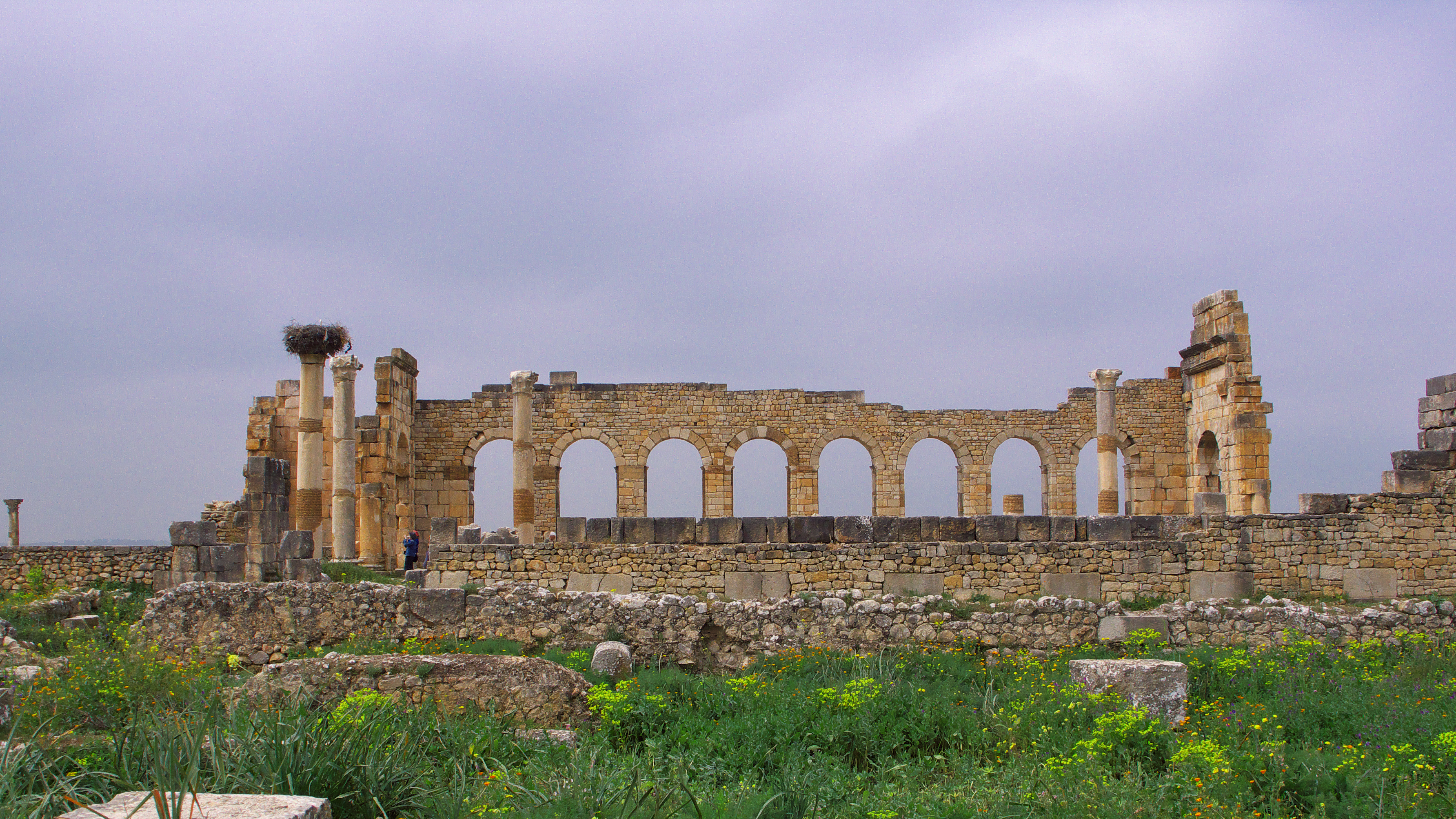 El principal centro de gobierno y justicia de la ciudad. Construída hacia el 210 y continuada por los emperadores Macrino y otros de la dinastía Severa.